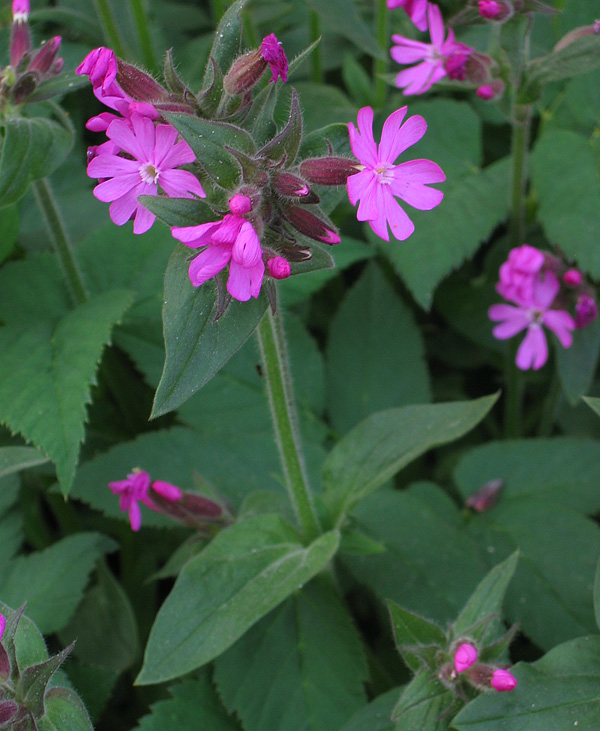 Puna-ailakki Silene dioica